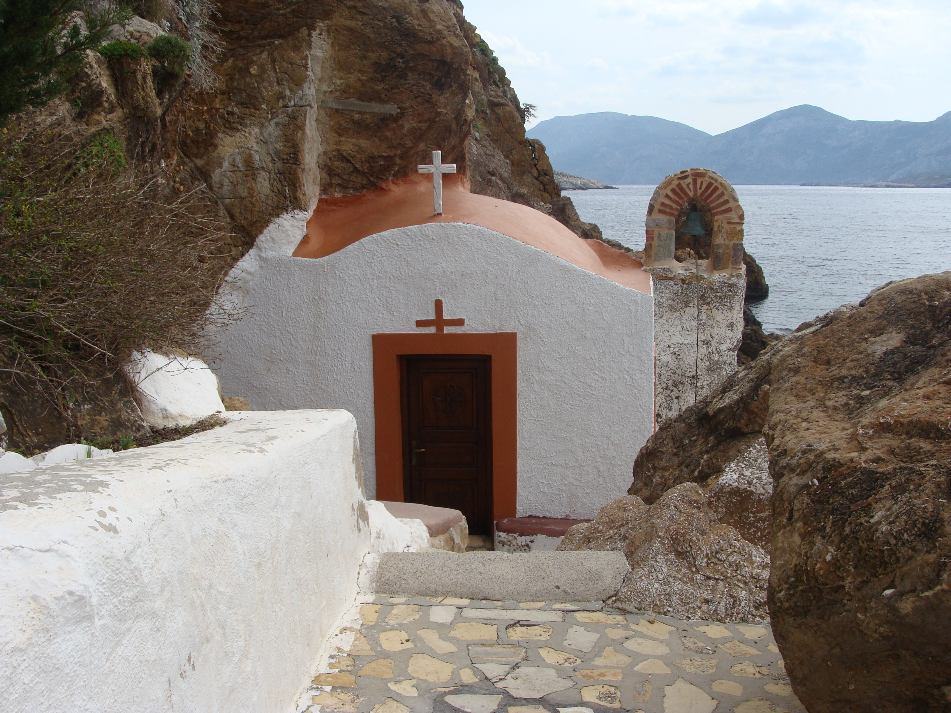 Παρεκκλήσι της Παναγίας της Καβουράδενας στον Ξηρόκαμπο